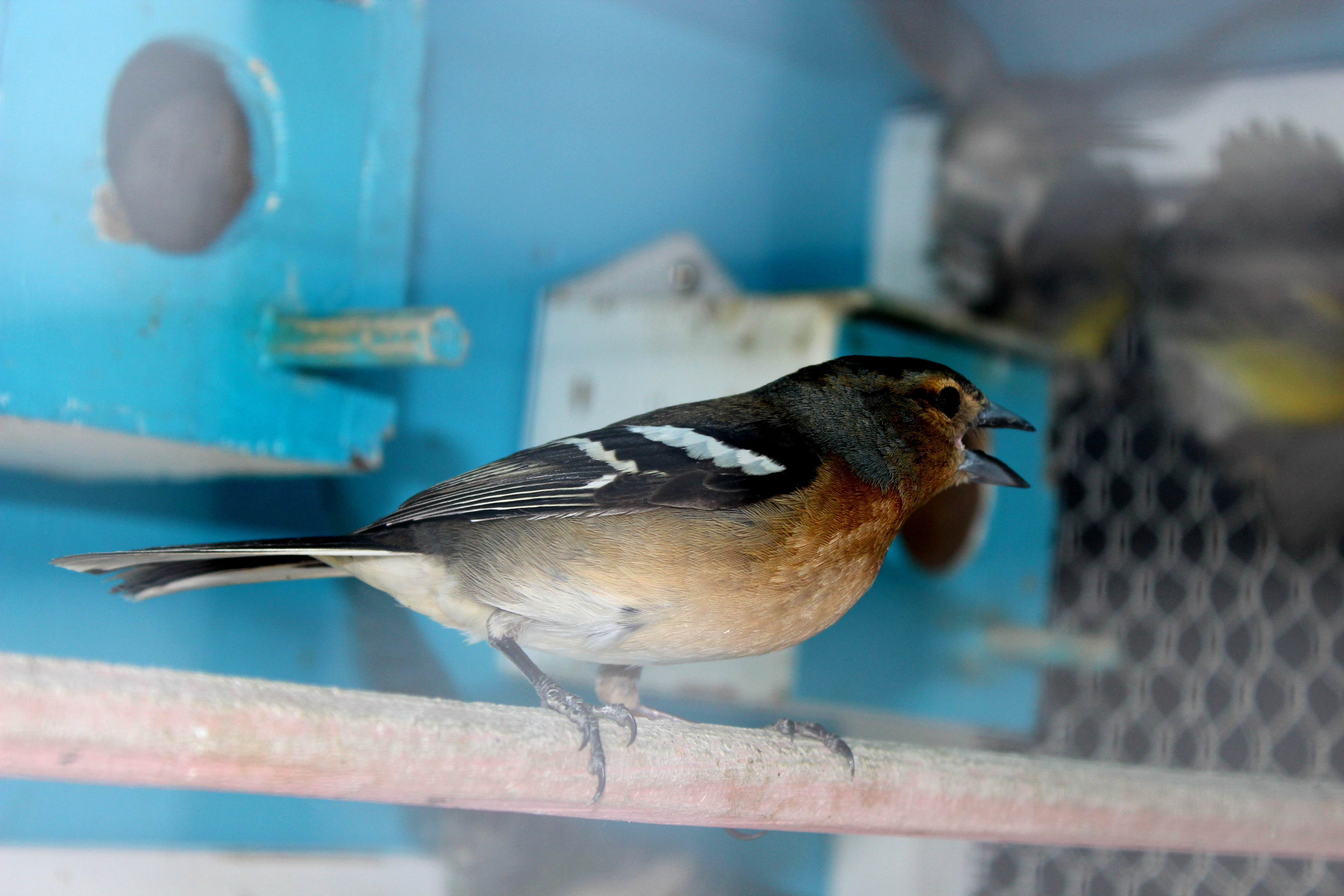 Fringilla coelebs. Esta fotografia foi tirada, na ilha terceira (Açores, Portugal)